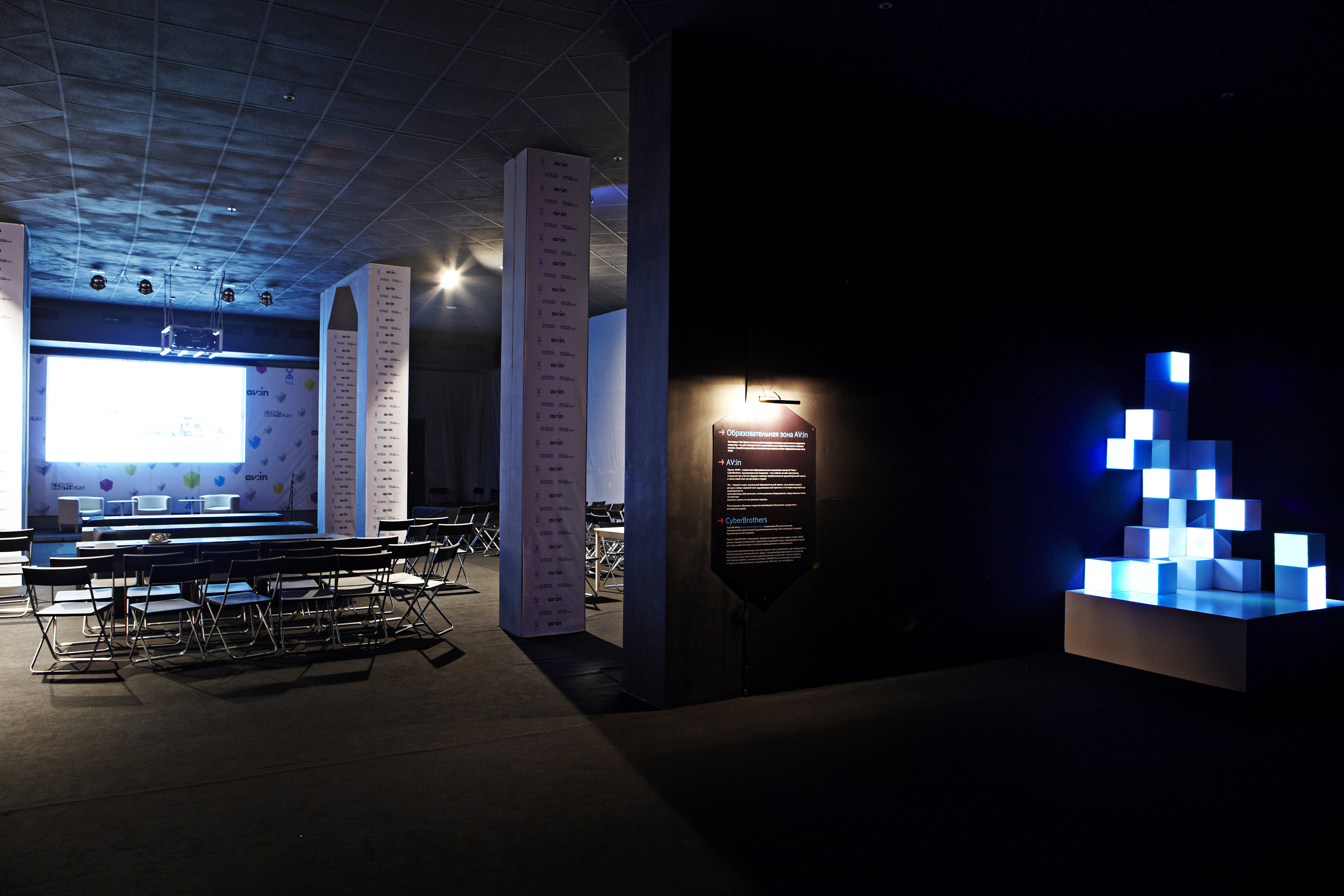 Yota Space 2010. Лекционный зал